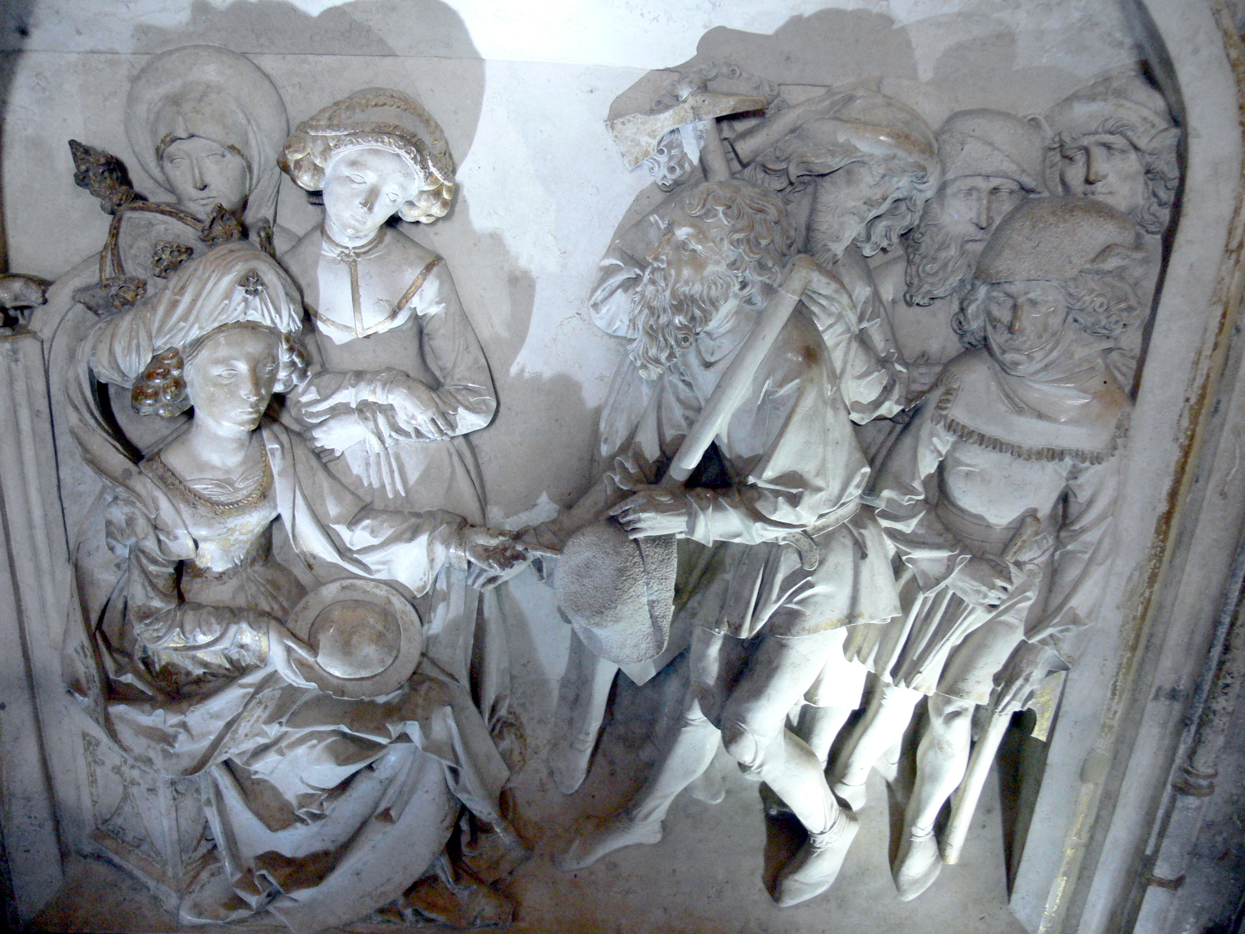 Grab Kaiser Heinrichs II. ( 1499 ) im Bamberger Dom. Pfennigwunder der Kaiserin Kunigunde: Bauarbeiter am Dom können aus einer Schüssel mit Geld nur soviel nehmen, wie sie wirklich verdient haben